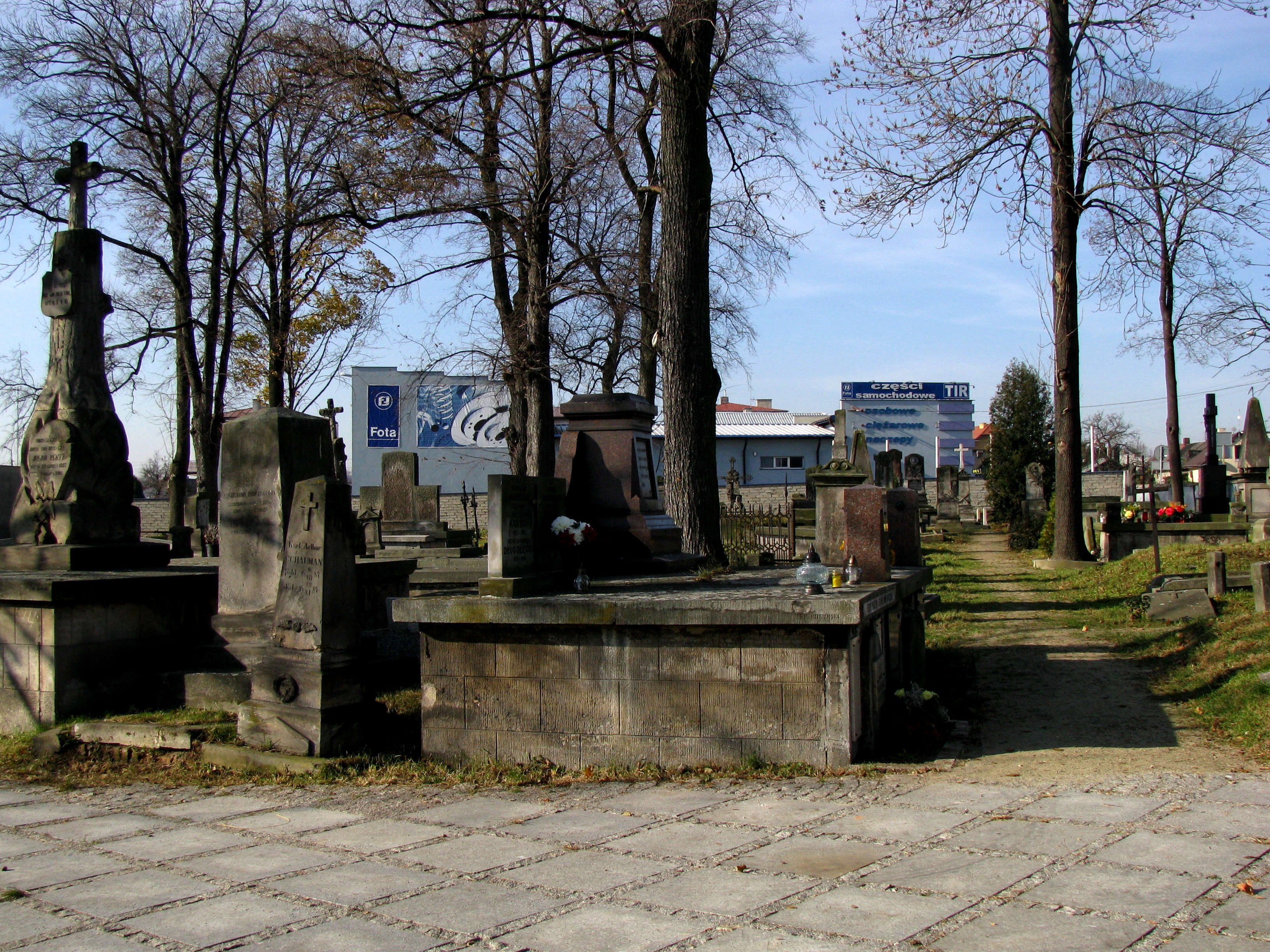 Radom, cmentarz ewangelicko-agsburski, zał. 1834r